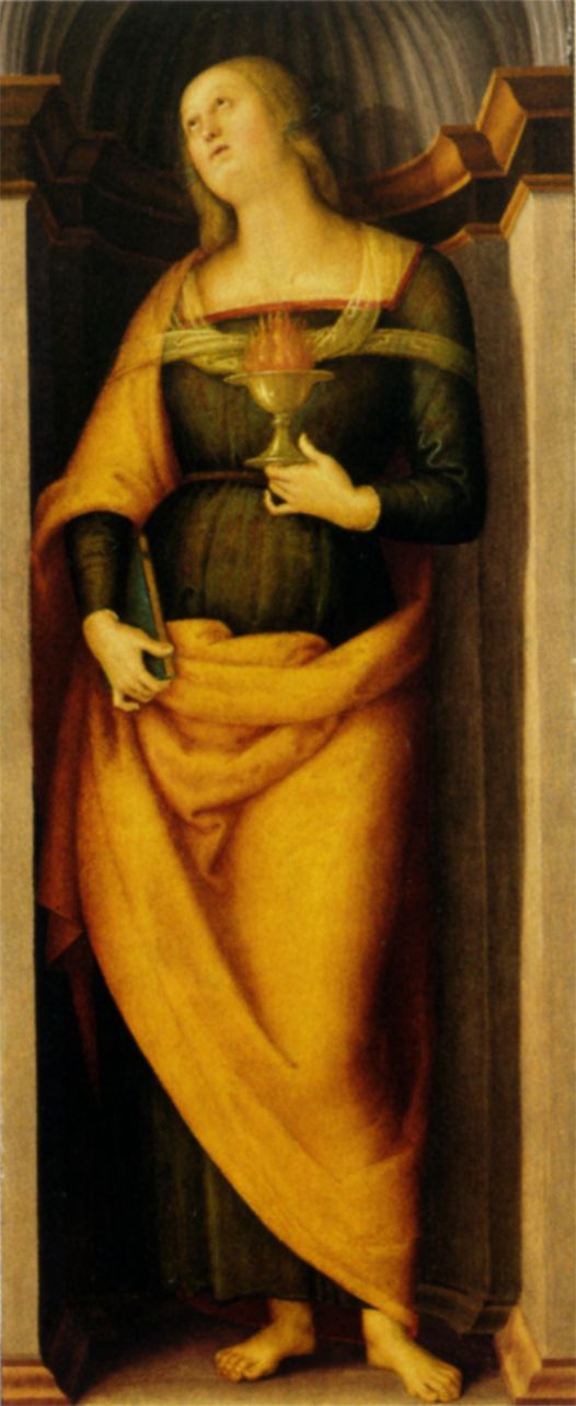 Pietro Perugino: Polittico dell’Annunziata (Santa Illuminata da Todi (?)). Cat. no. 74 in Vittoria Garibaldi: Perugino. Catalogo completo. Octavo, Firenze 2000, ISBN 88-8030-091-1